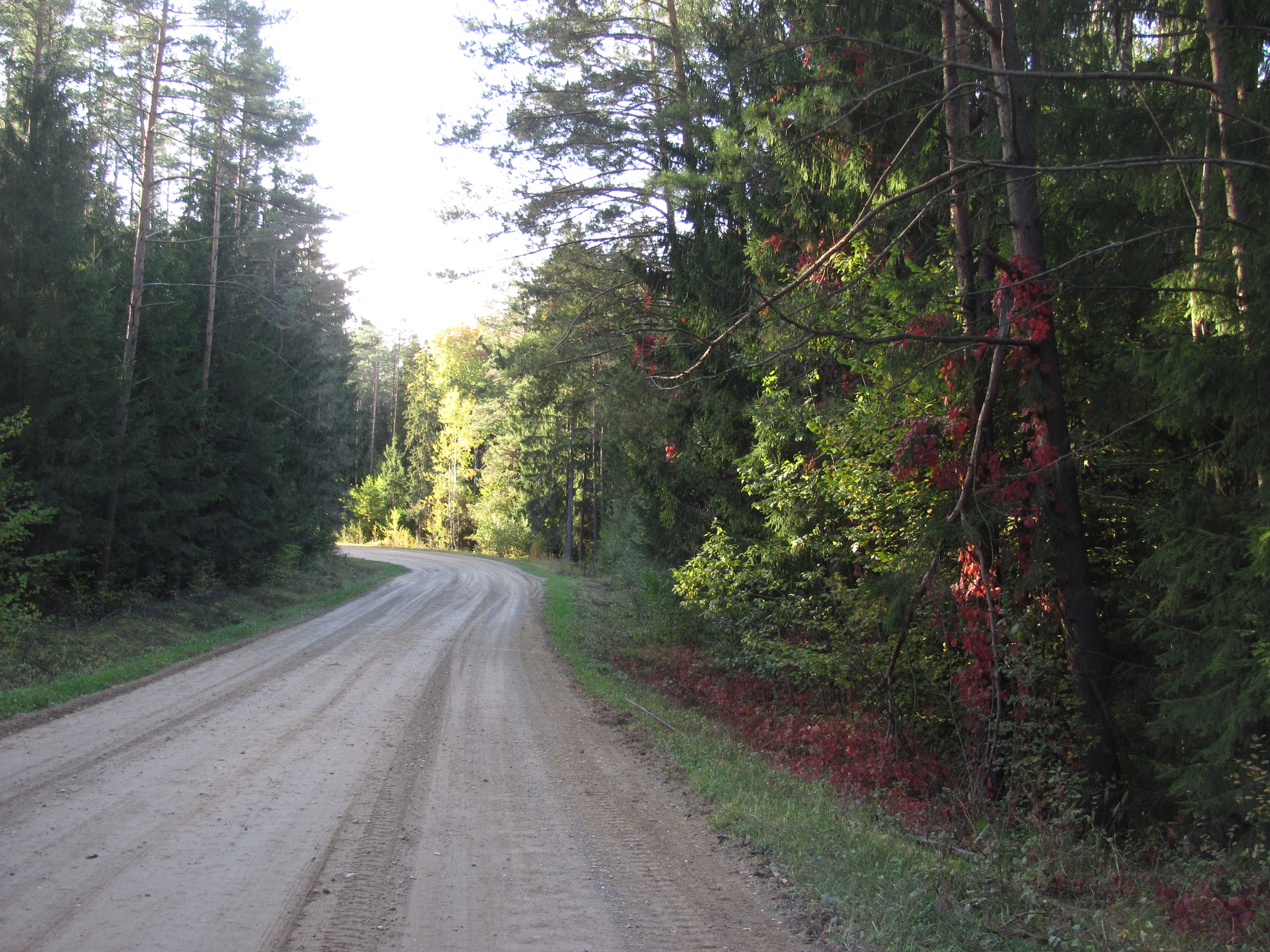 Rokiškio kaimiškoji sen., Lithuania